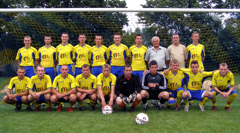 Sadra neptuna konskie na sezon 2009/2010. Zdjecie zrobione przed meczem z Heko Czermno